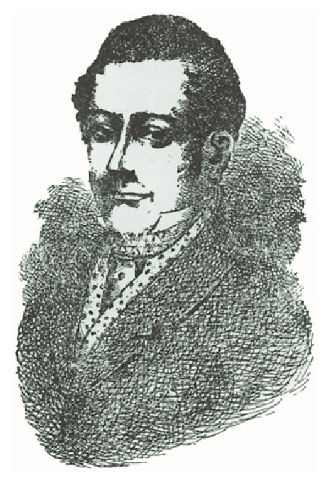 José Francisco Aizkibel, garai hartako grabatu batean.